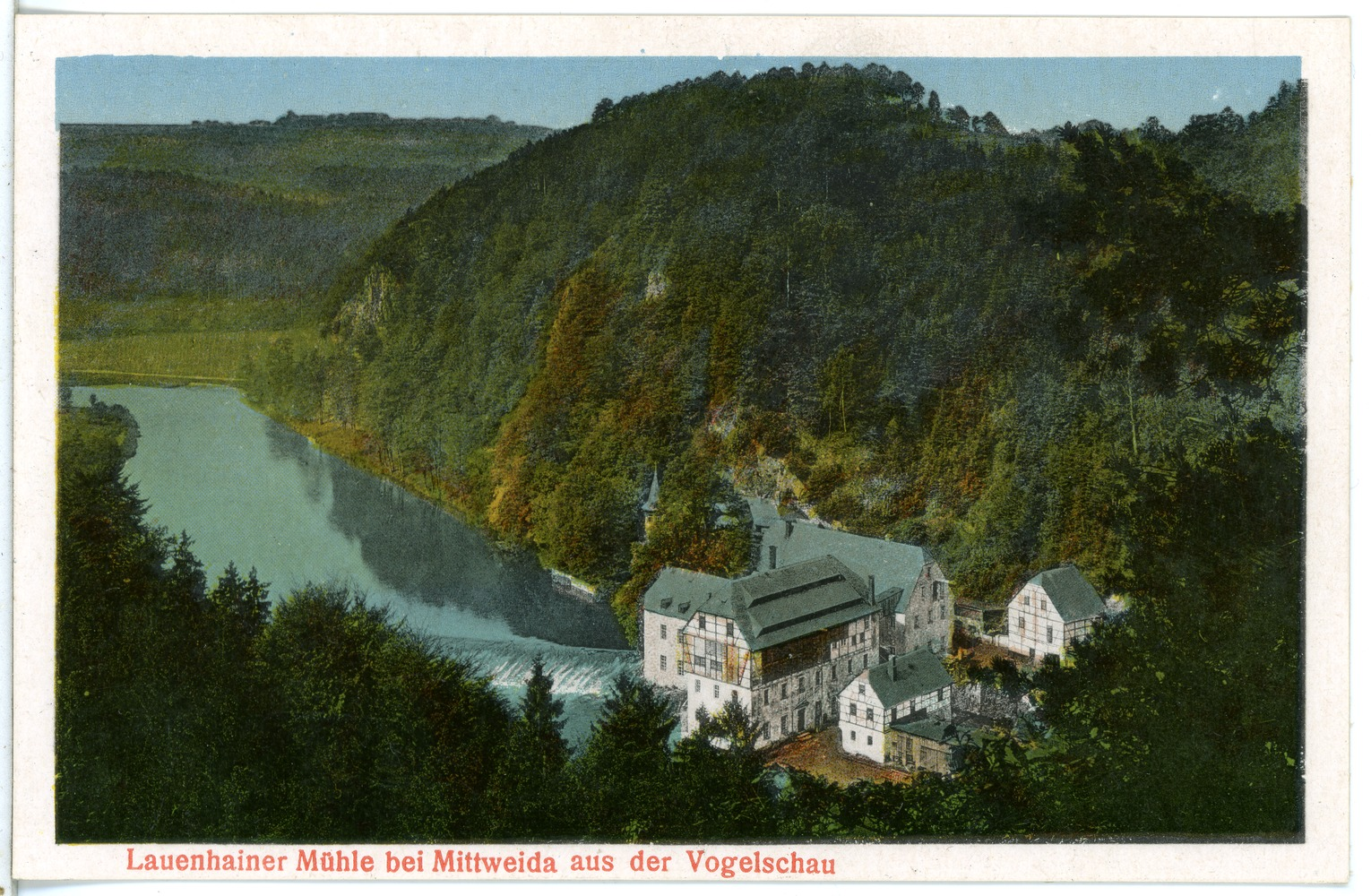 Lauenhain; Lauenhainer Mühle aus der Vogelschau This postcard is from publisher Brück & Sohn in Meißen ( postcard has a unique number 22236 and is available in a higher resolution at the publisher. This images was uploaded in a cooperation project between Wikipedians and the publisher.